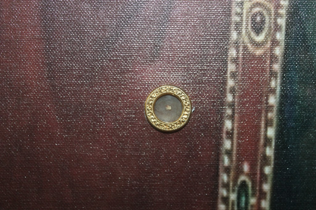 Мощи были дарованы по случаю престольного праздника в 2014 году. Хранятся в иконе вмц. Параскевы.